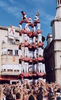 Primer 9 de 8 descarregat de la història, fet el 7 d'octubre del 2001 per la Colla Vella dels Xiquets de Valls en la diada del Mercadal de Reus.